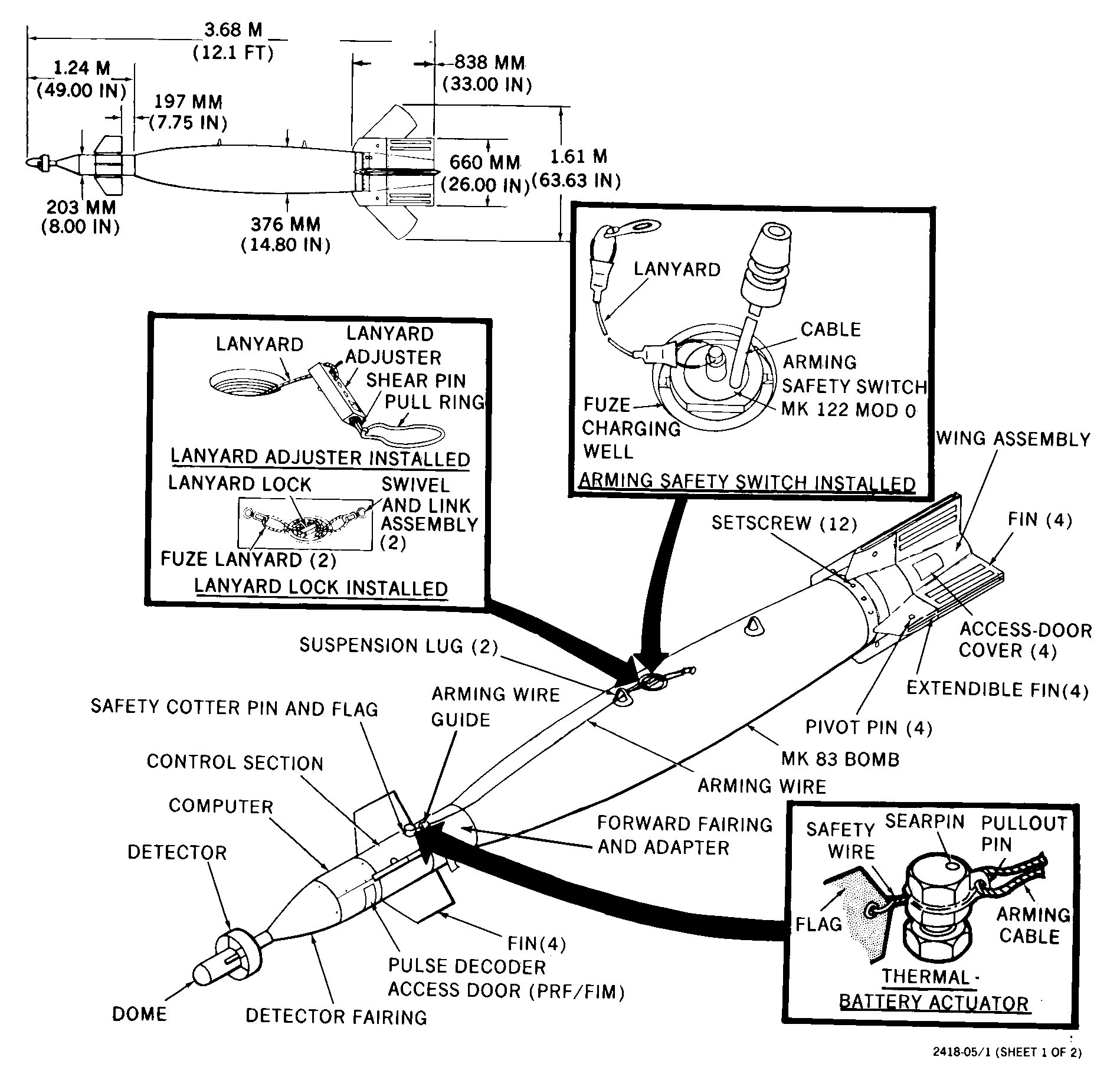 Amerykańska bomba kierowana GBU-16/B